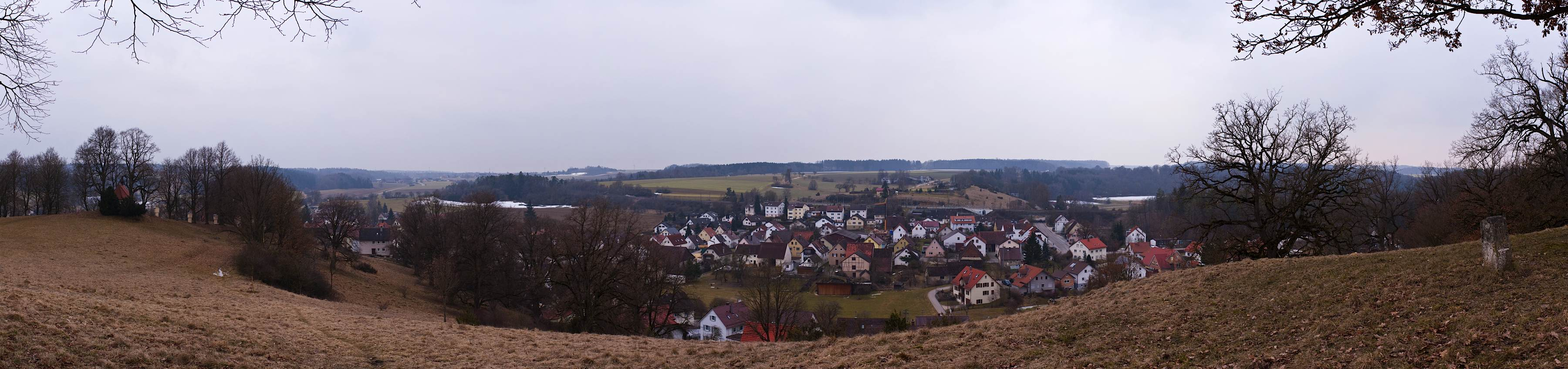 Westerstetten, Deutschland vom Kreuzberg.